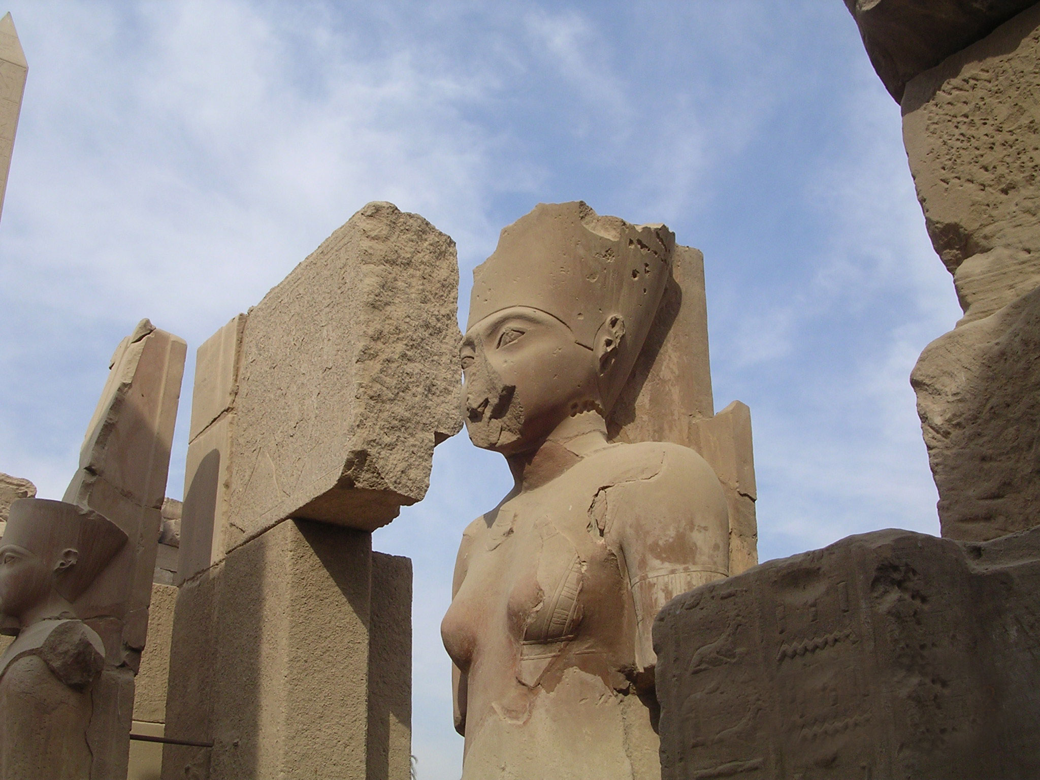 Descrizione: Statua della dea Amonet. Sulla sinistra si intravede la statua del dio Amon - Autore: Amaunet - Data: 2008 - Fonte: lavoro proprio - Licenza